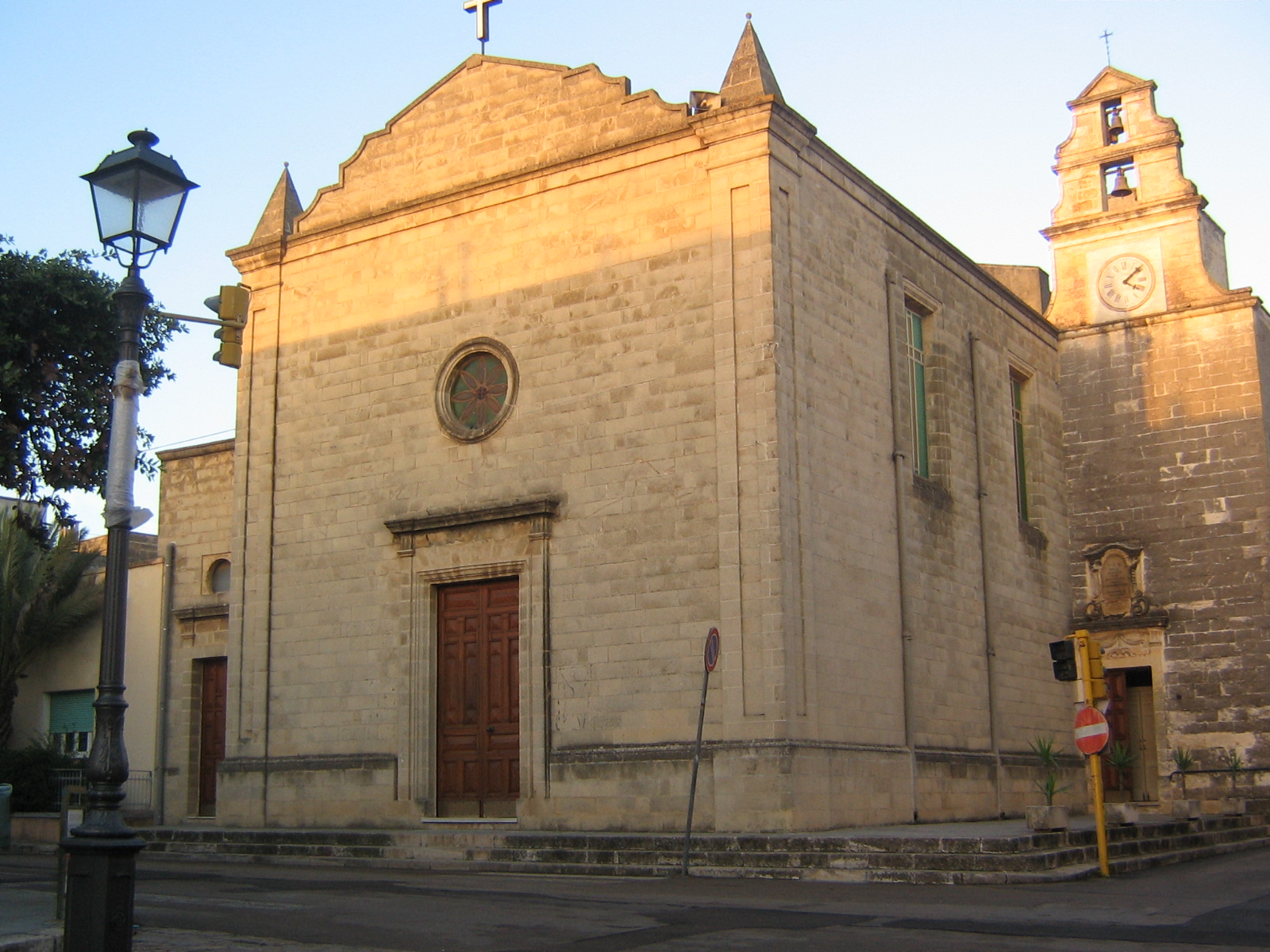 Chiesa Madre di Lucugnano